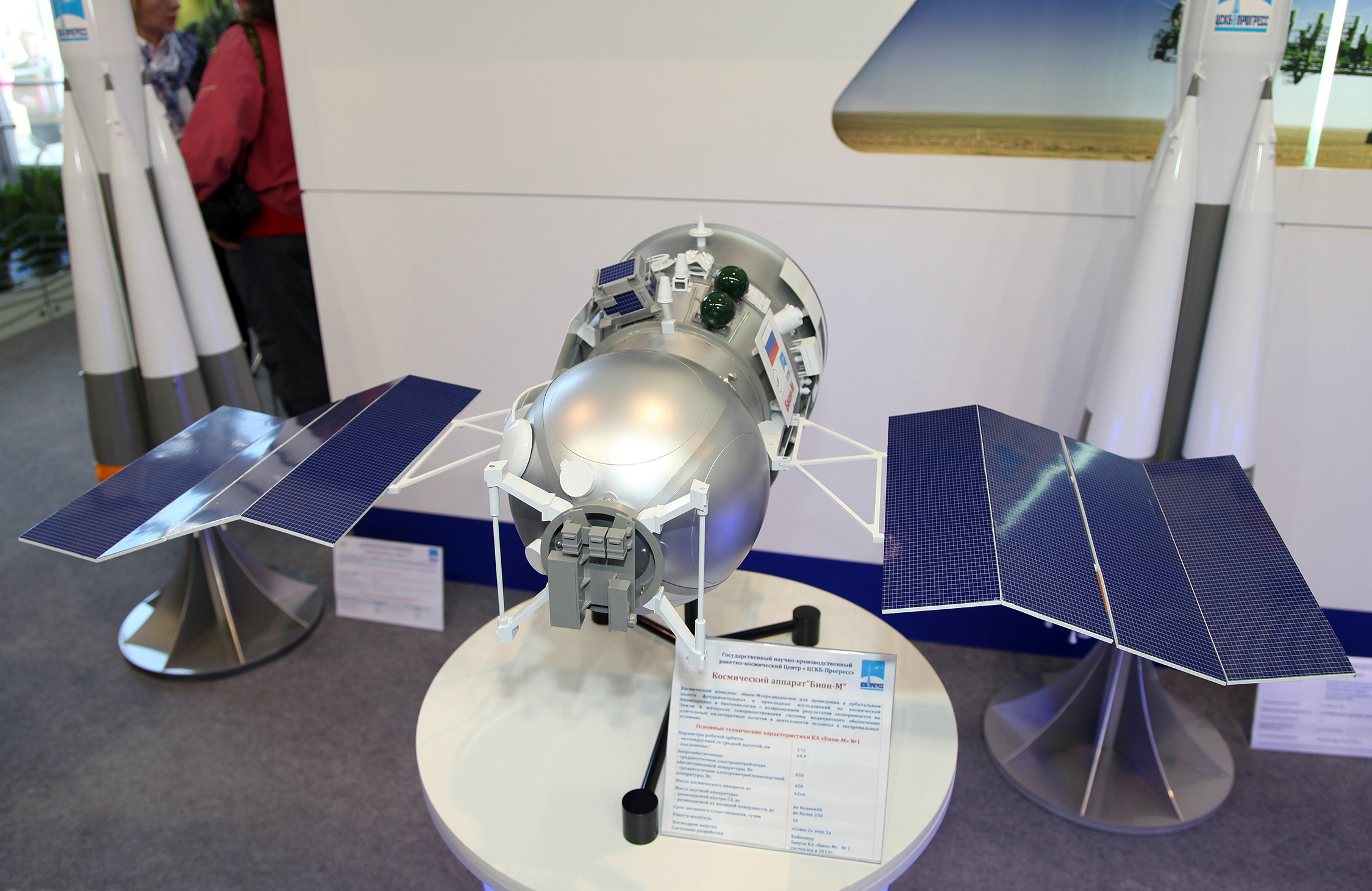 Космический аппарат Бион-М (Bion-M spacecraft)